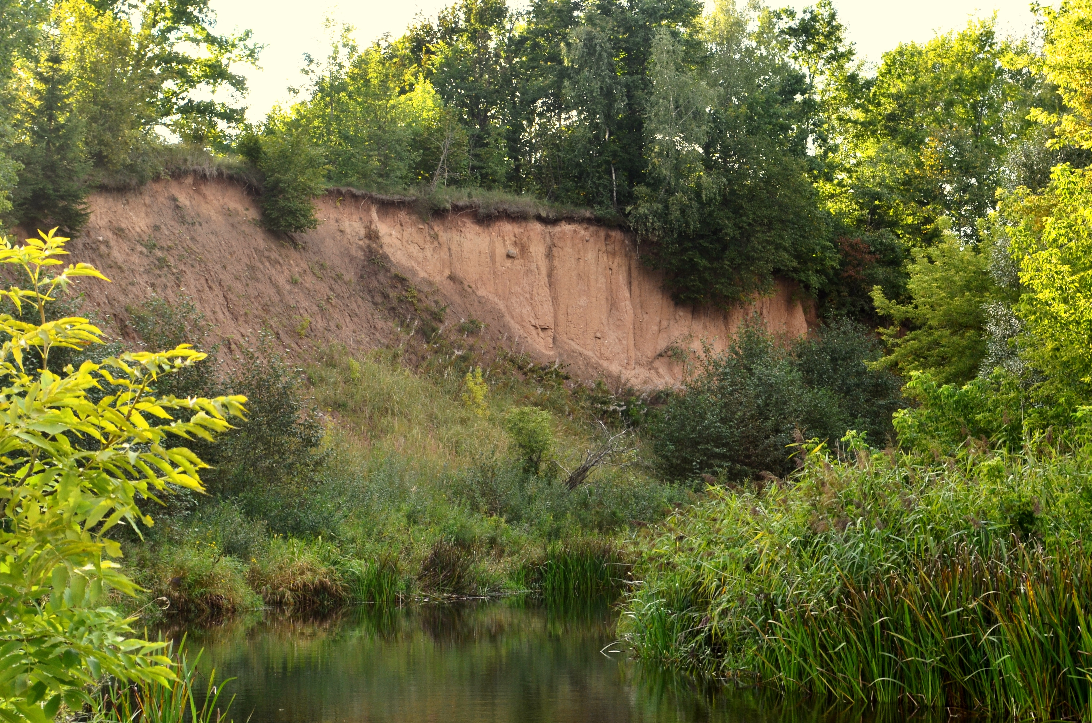 Vosbučių atodanga Šušvės krante, Kėdainių r.